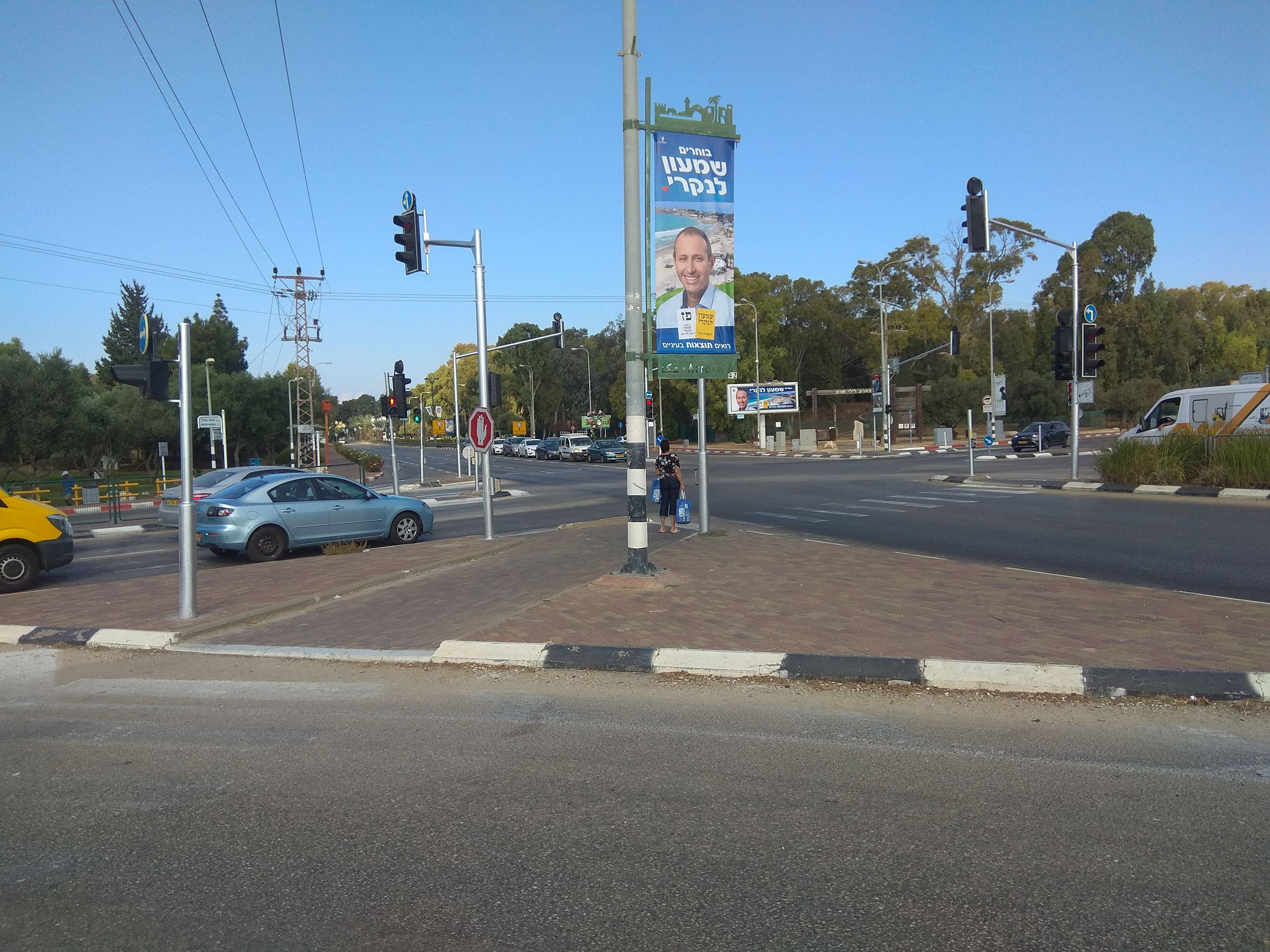 שלטי בחירות בעיר עכו